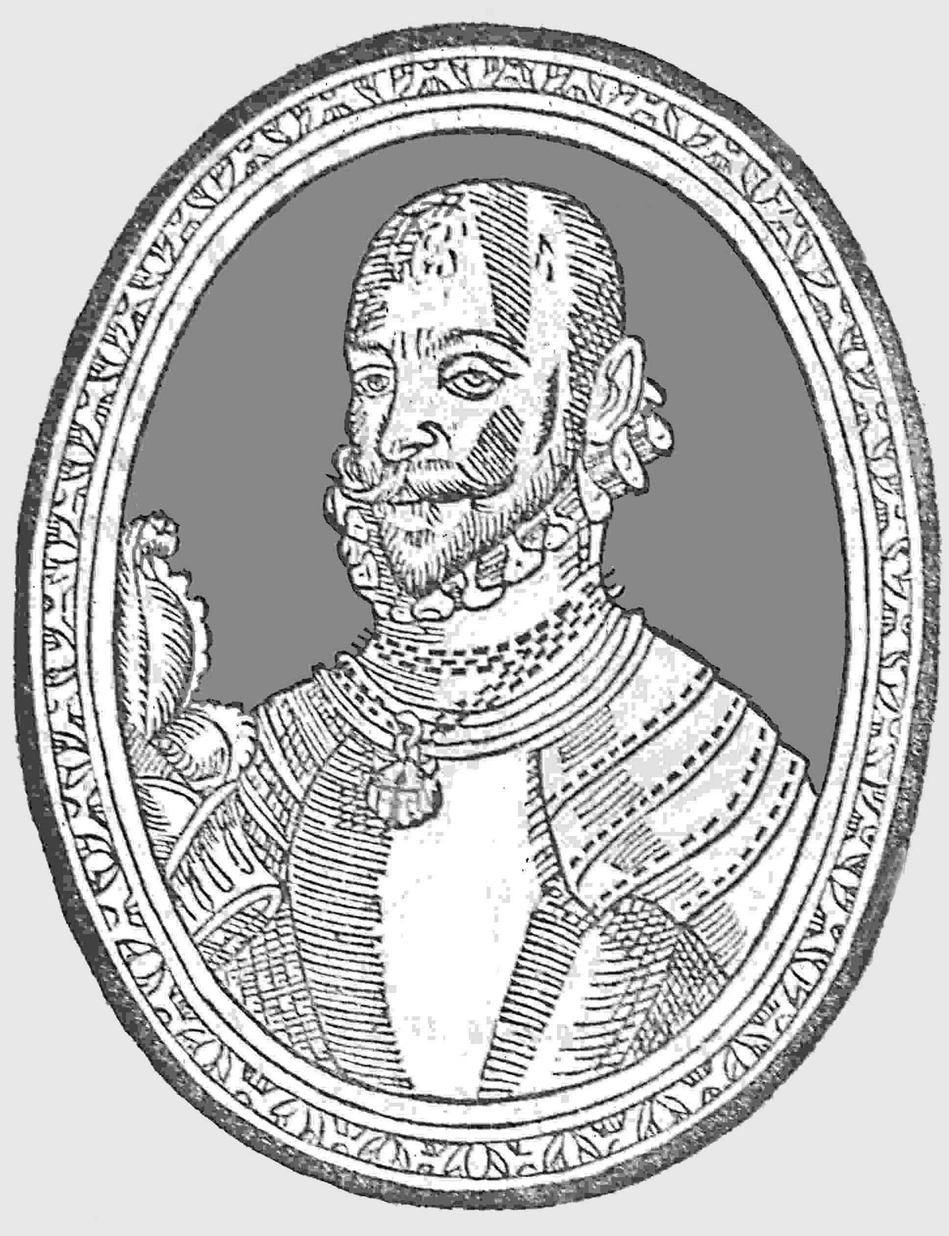 Baltasar Elisio de Medinilla; Porträt/portrait/retrato